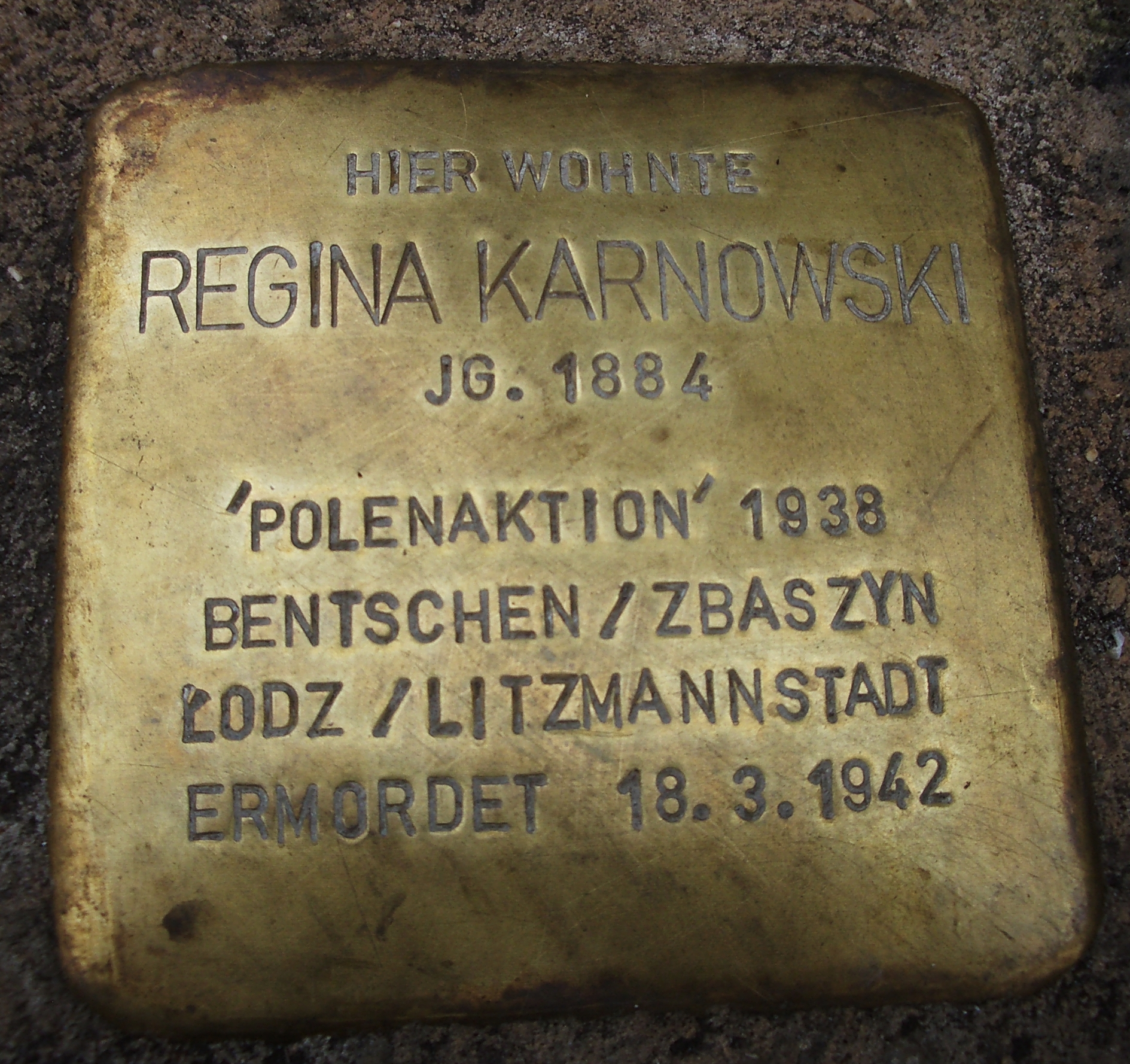 Der Stolperstein für Regina Karnowski befindet sich in der Beethovenstraße 11 in Neu-Ulm, Stadtteil Offenhausen.